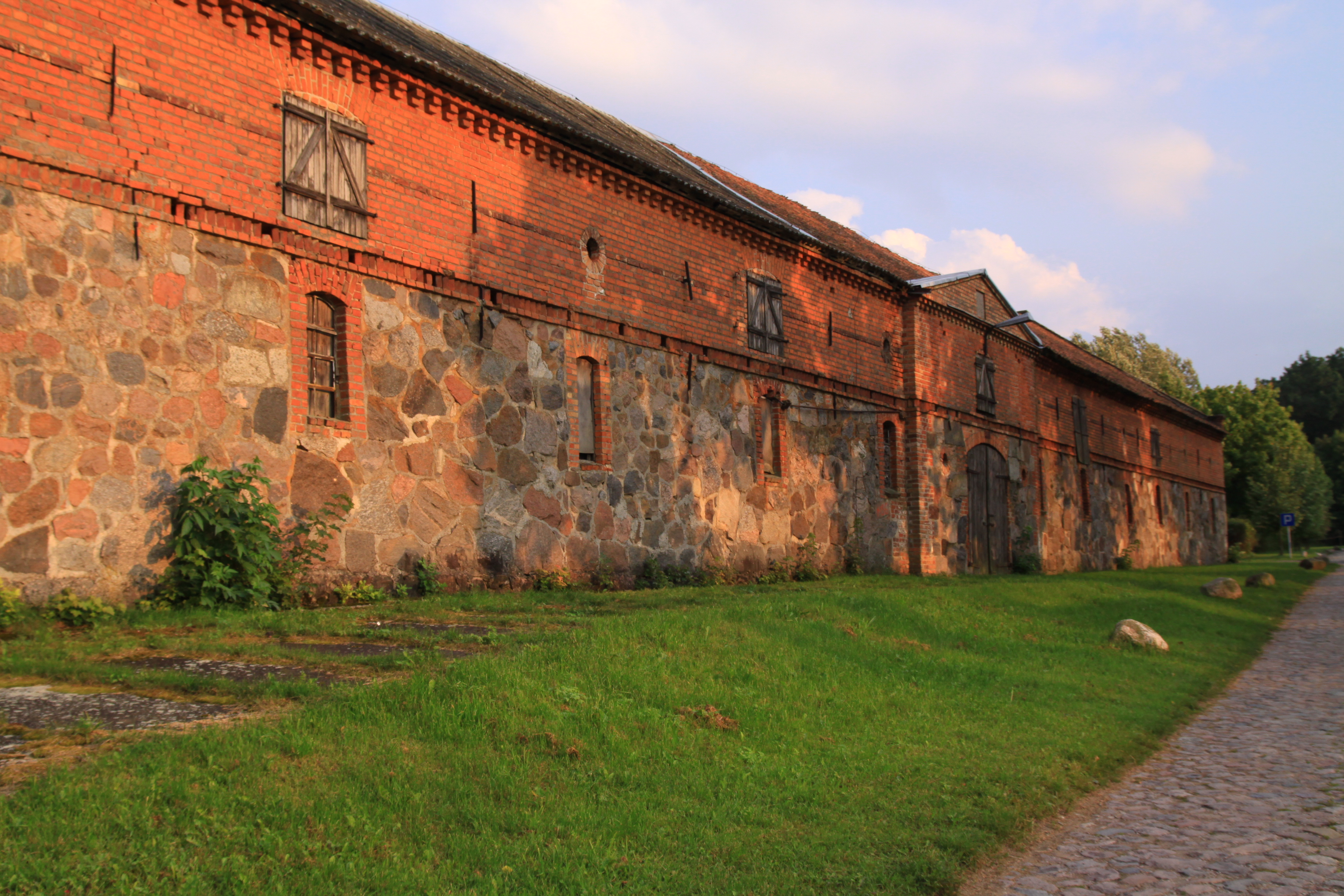 Nakomiady, owczarnia folwarczna, 2 poł. XIX